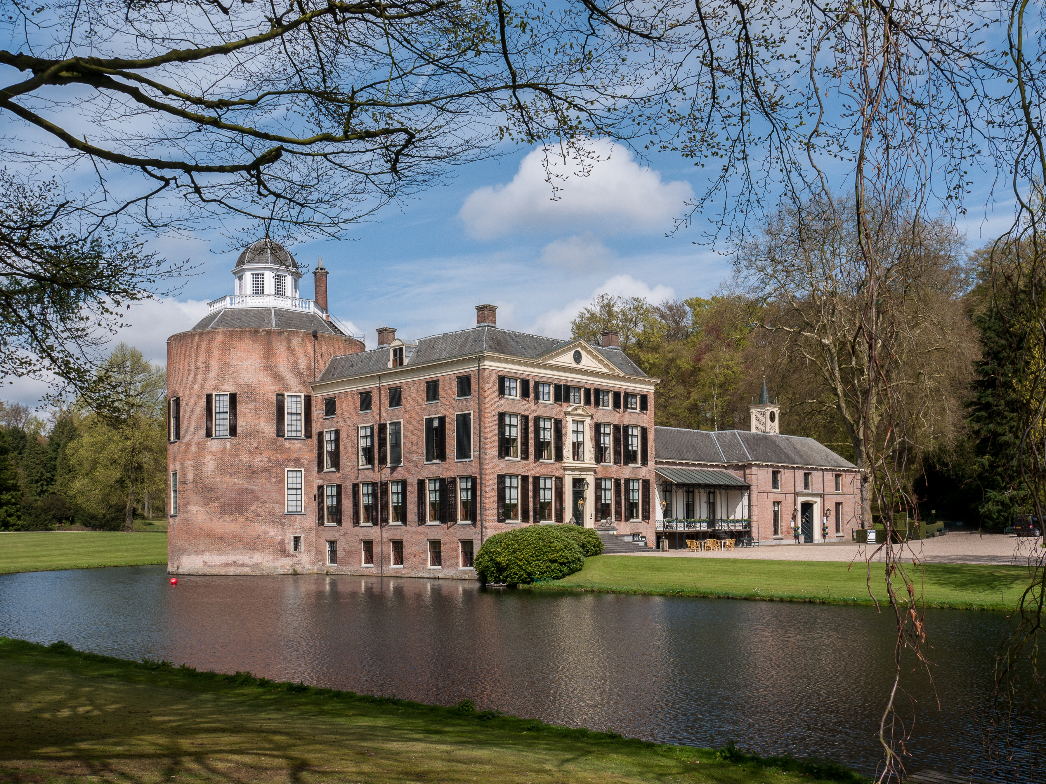 Schloss Rosendael im Gelderland in den Niederlanden